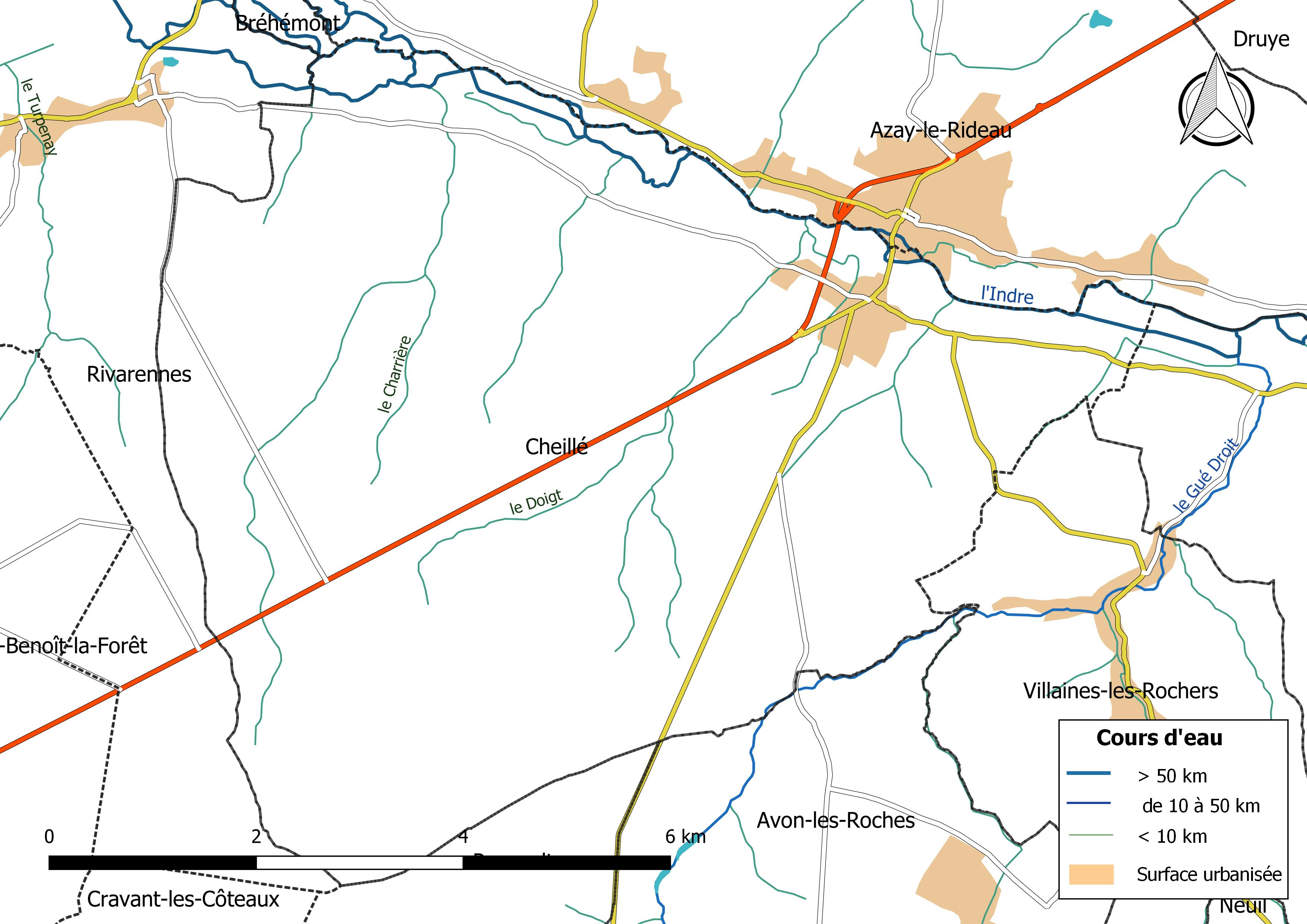 Carte du réseau hydrographique de la commune de Cheillé (France).